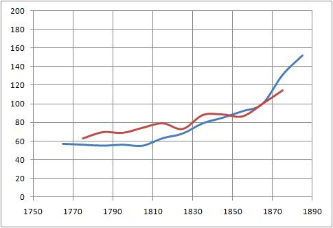 Living Standards during Industrial Revolution, Feinstein (red line), Clark (blue line). Estimates taken from: Feinstein, Charles (1998): Pessimism Perpetuated: Real Wages and the Standard of Living in Britain during and after the Industrial Revolution. The Journal of Economic History, Vol. 58, No. 3; Clark, Gregory (2005): The Condition of the Working Class in England, 1209–2004. Journal of Political Economy, Vol. 113, No. 6.